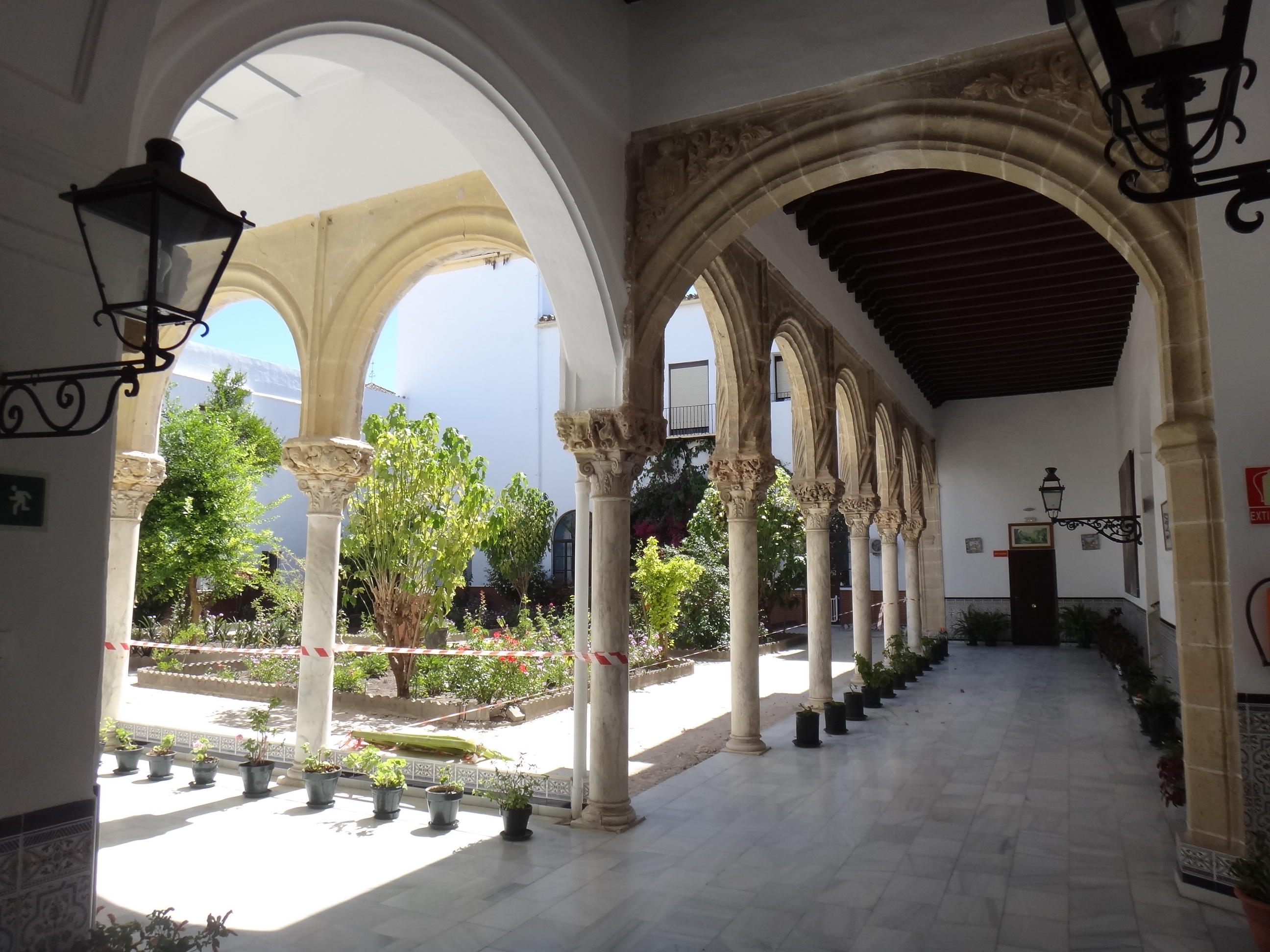 Patio de la casa-palacio de los Ponce de León en Jerez de la Frontera (Andalucía, España)